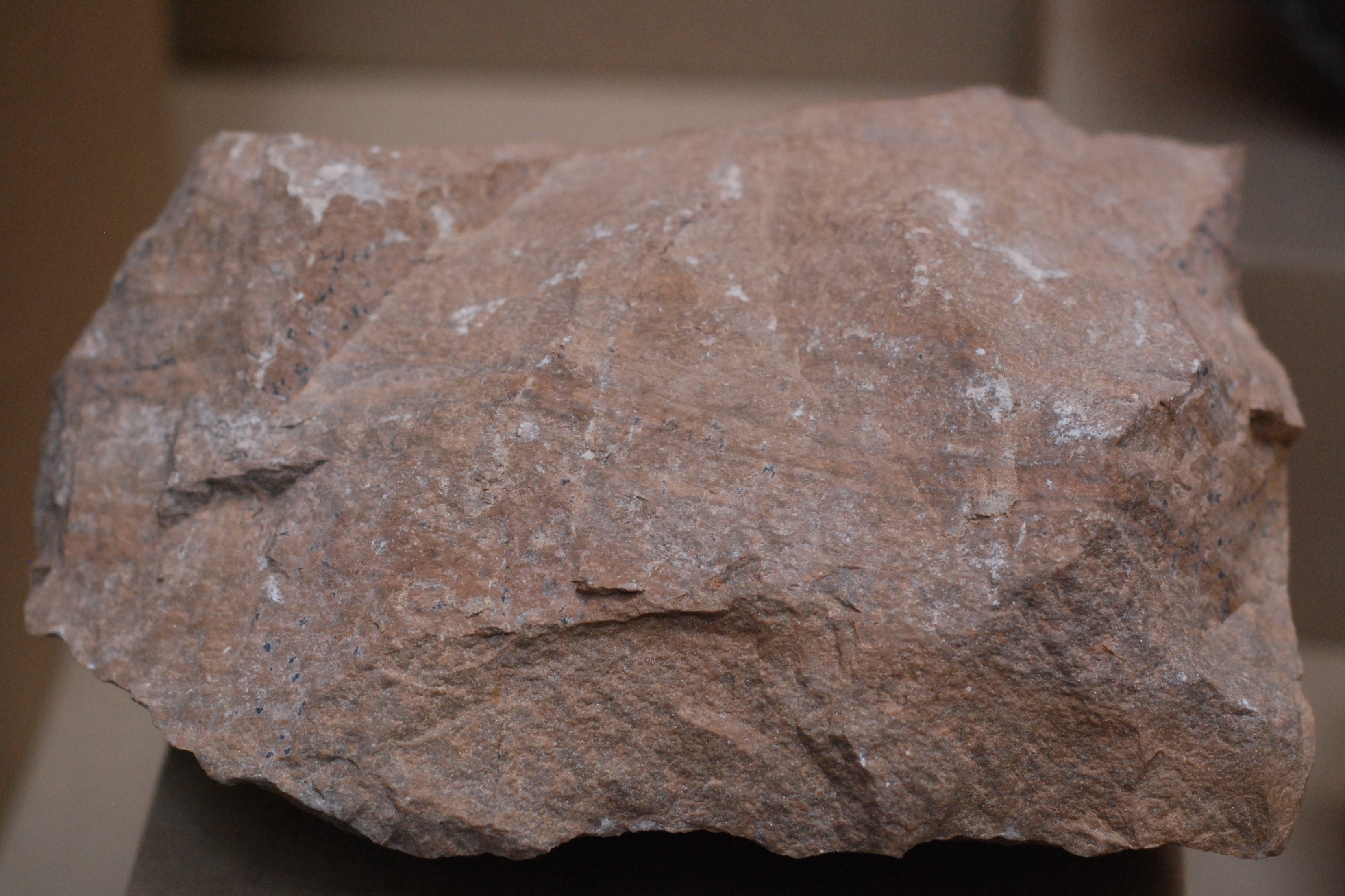 Dolomía (Carbonato doble de calcio y magnesio). Esta roca se utiliza en la industria siderúrgica, en la industria del vidrio y como roca ornamental, entre otros usos. Olavarría, Buenos Aires.